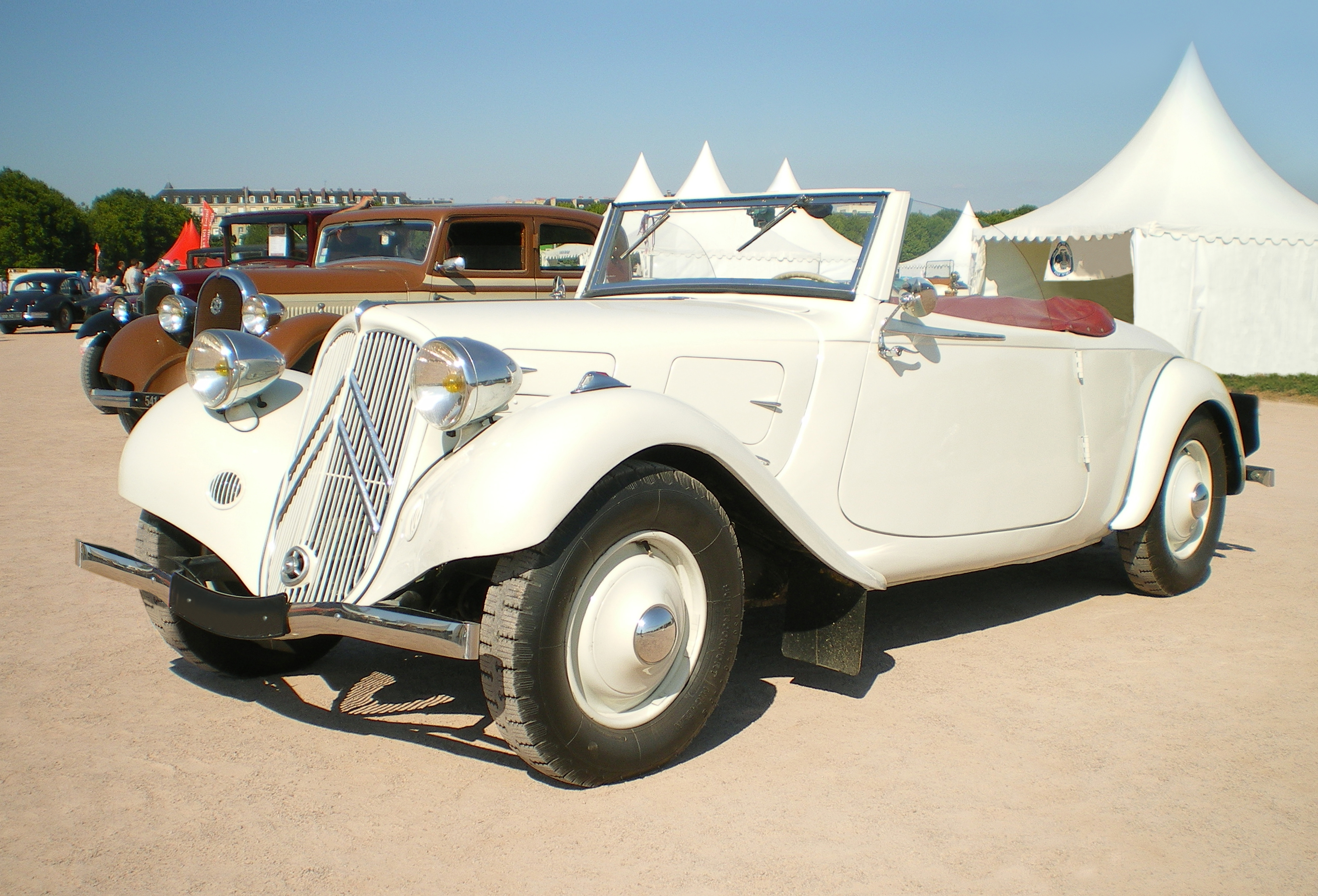 Citroën Traction cabriolet.